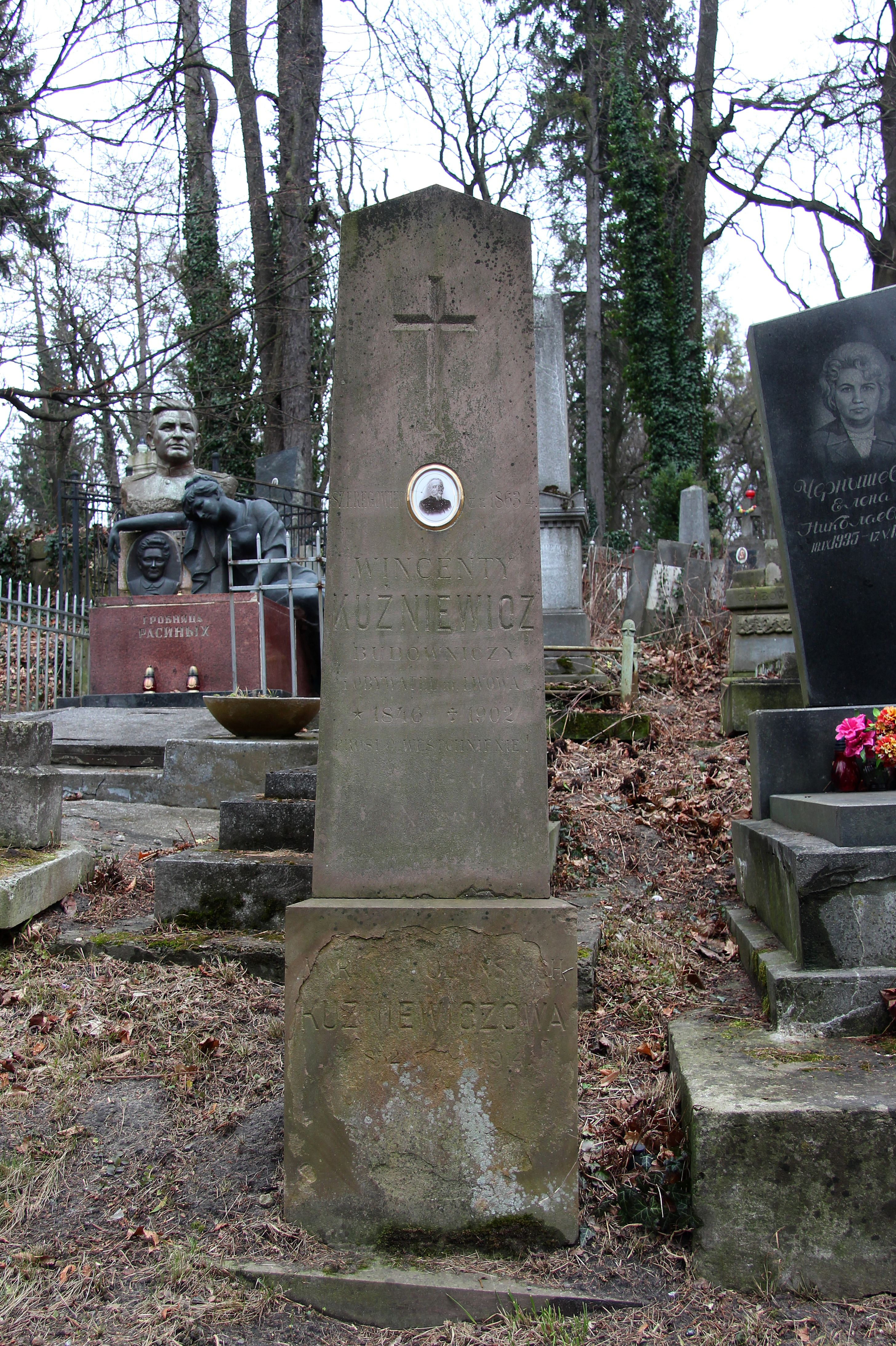 Пам'ятник на могилі В.Кузневича.Личаківський цвинтар , поле № 15.